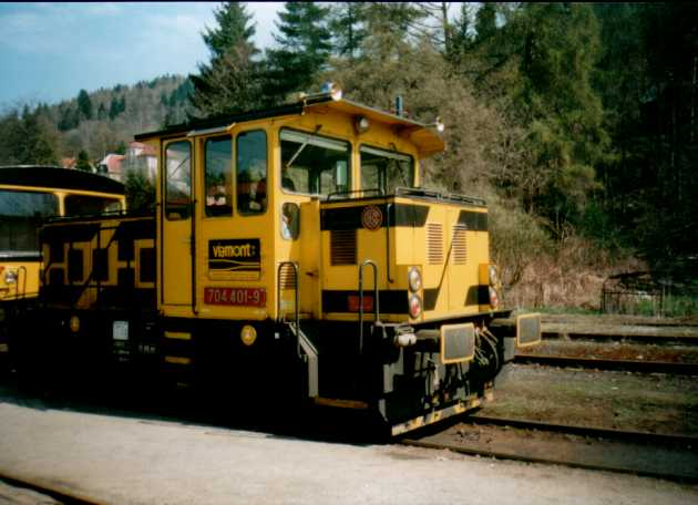 Lokomotiva řady 704 společnosti Viamont